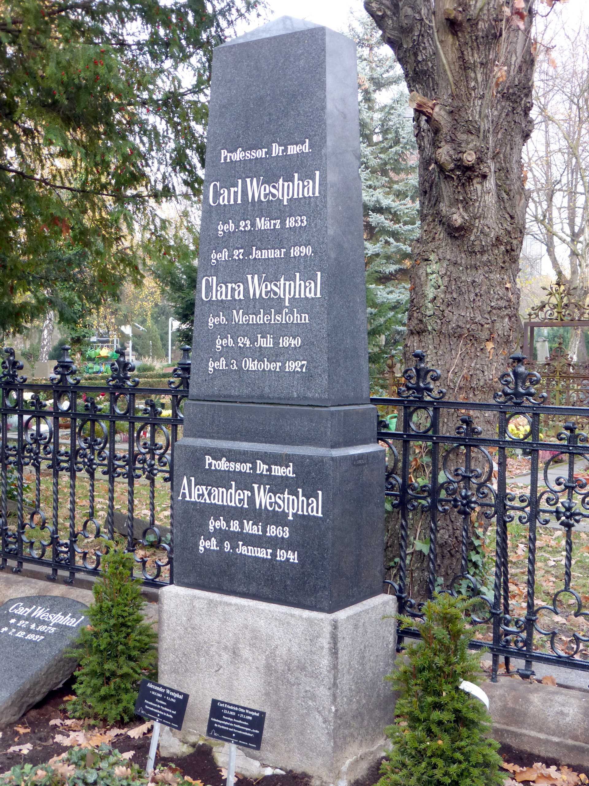 Deitsch: Grabstein von Carl Westphal auf dem Friedhof I der Gemeinde Jerusalems- und Neue Kirche (vor dem Halleschen Tor in Berlin-Kreuzberg)